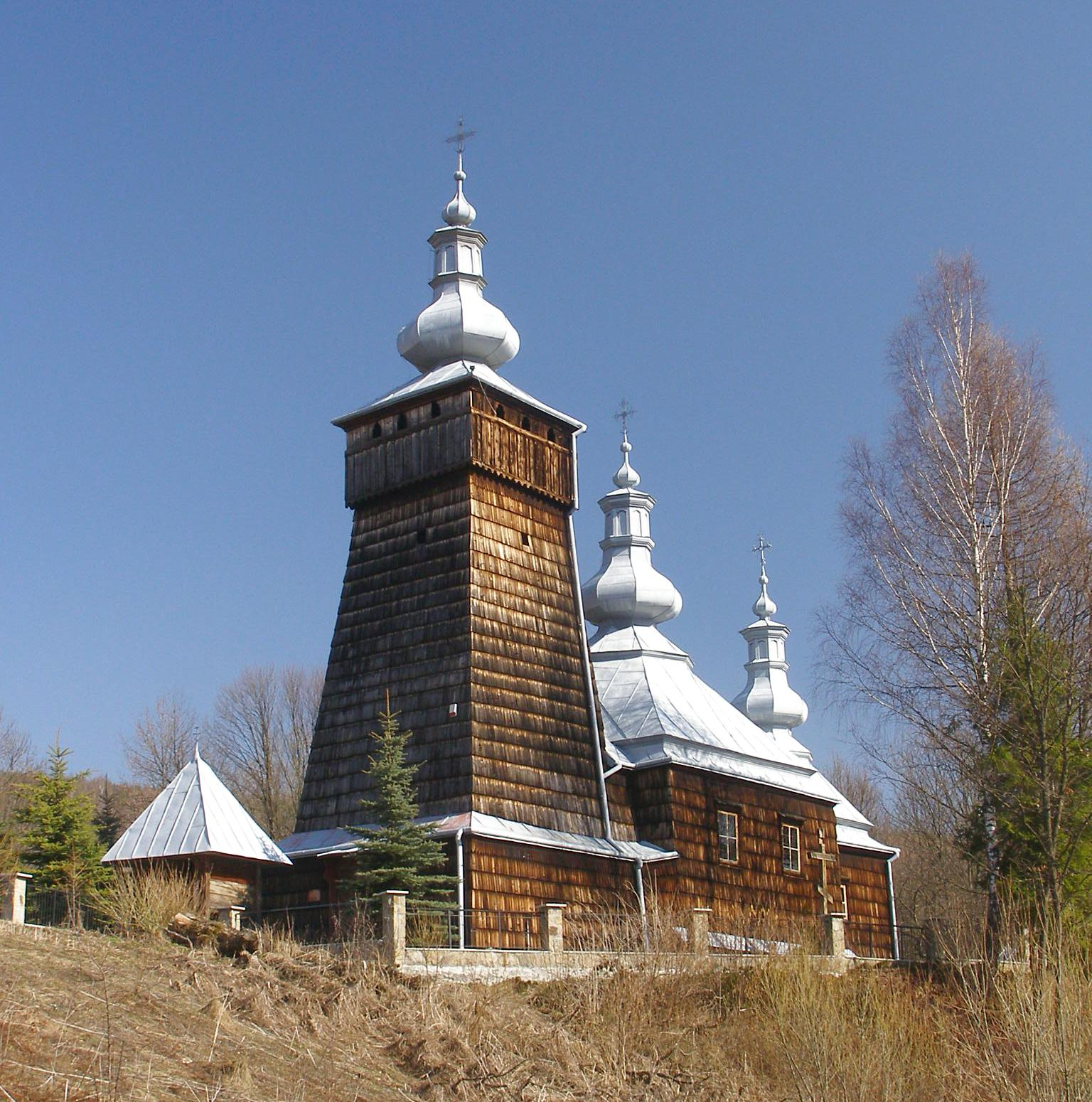 wieś Leszczyny